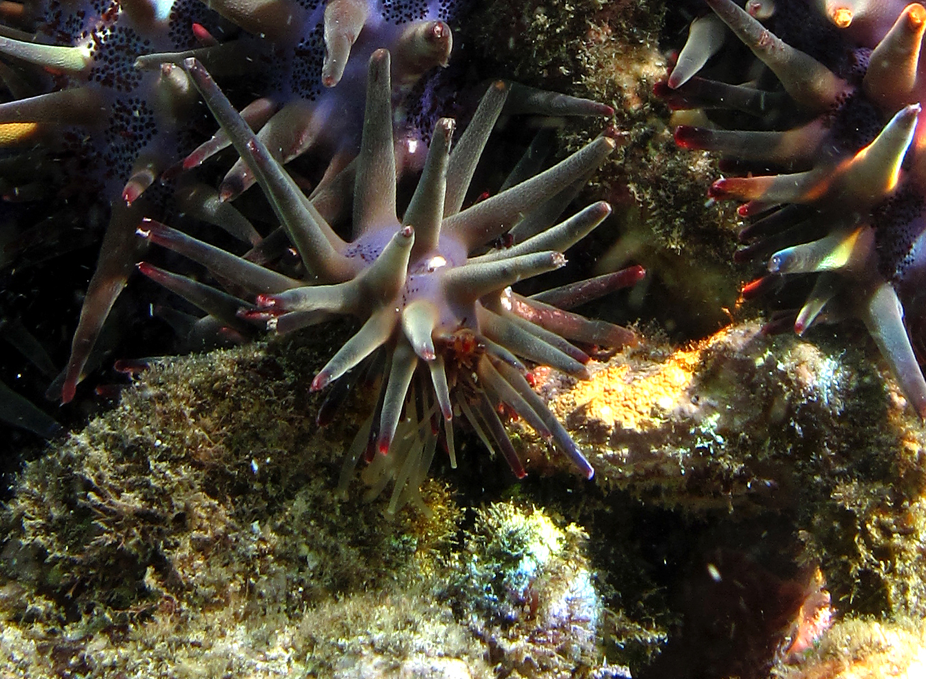 Gros plan sur une ocelle d'étoile de mer Acanthaster planci (à la Réunion).